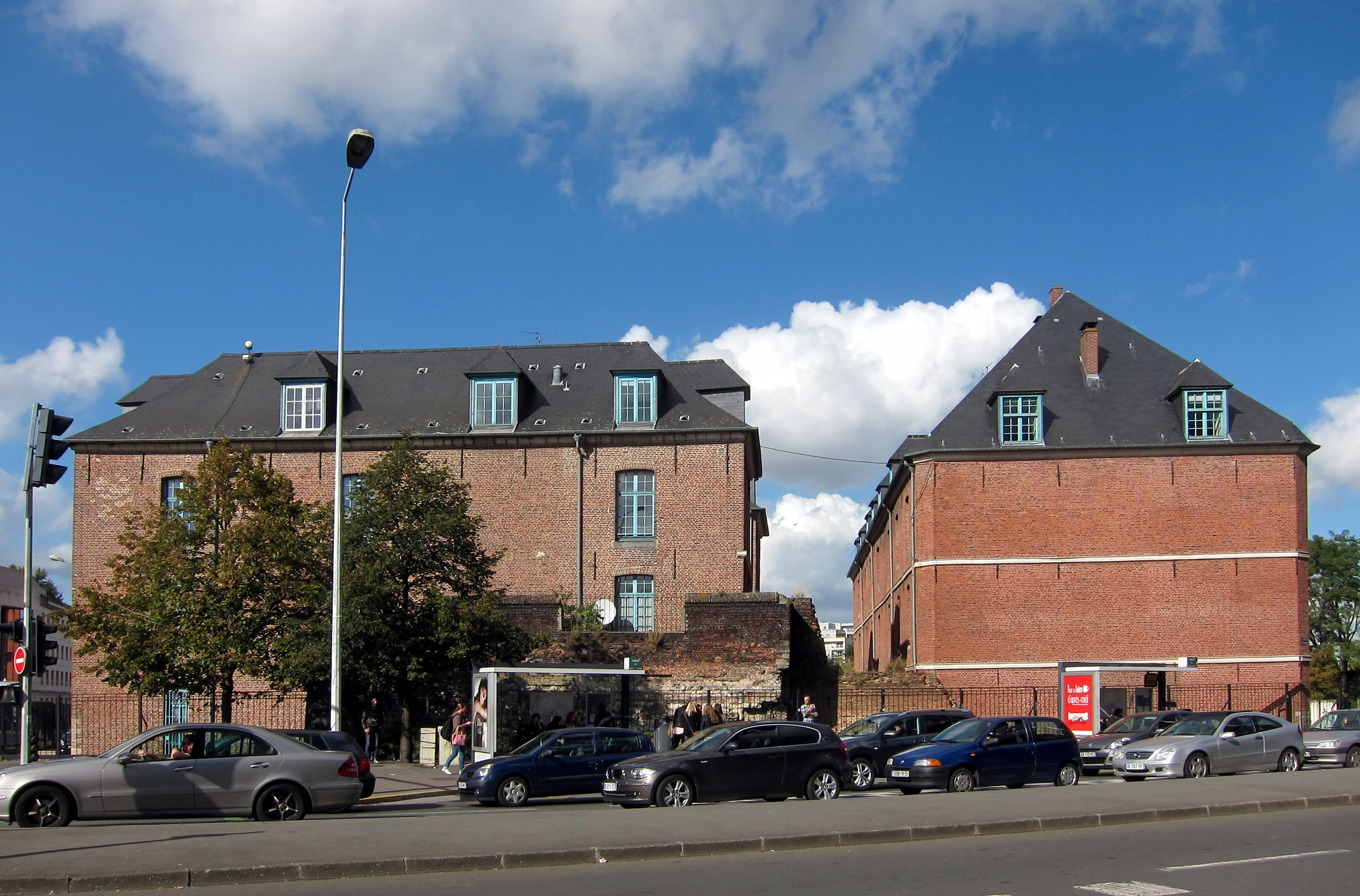 L'ancienne caserne Souham, rue du Vieux-Faubourg à Lille.